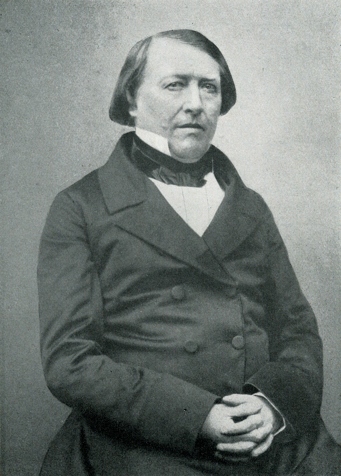 Karl Friedrich Nägelsbach (1806-1859), deutscher klassischer Philologe